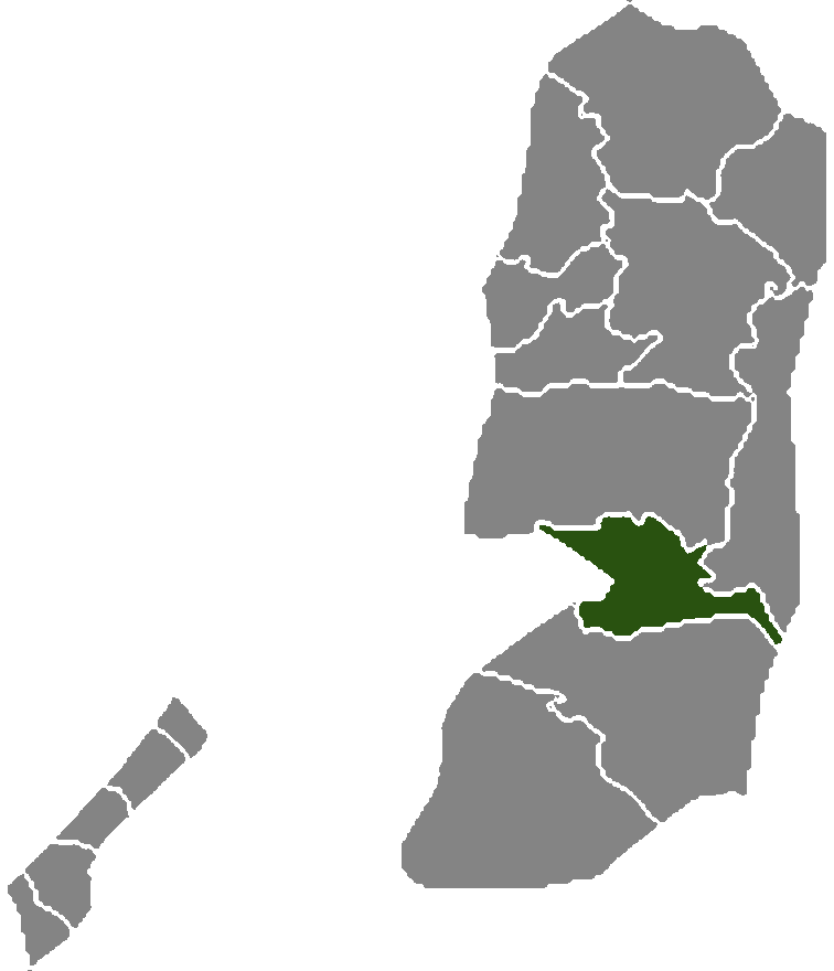 Palestine governorate Jerusalem